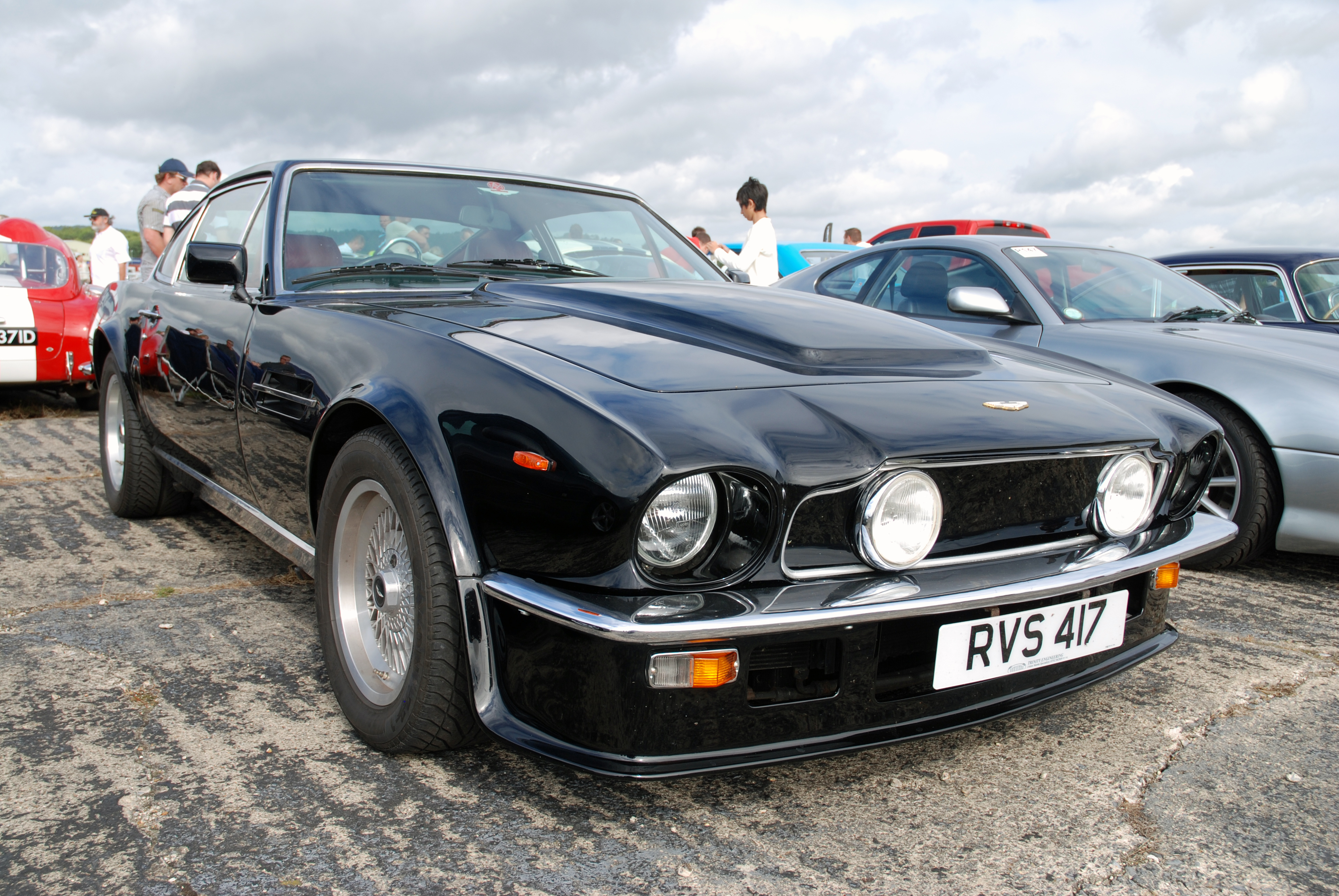 Dunsfold,Aug 2009